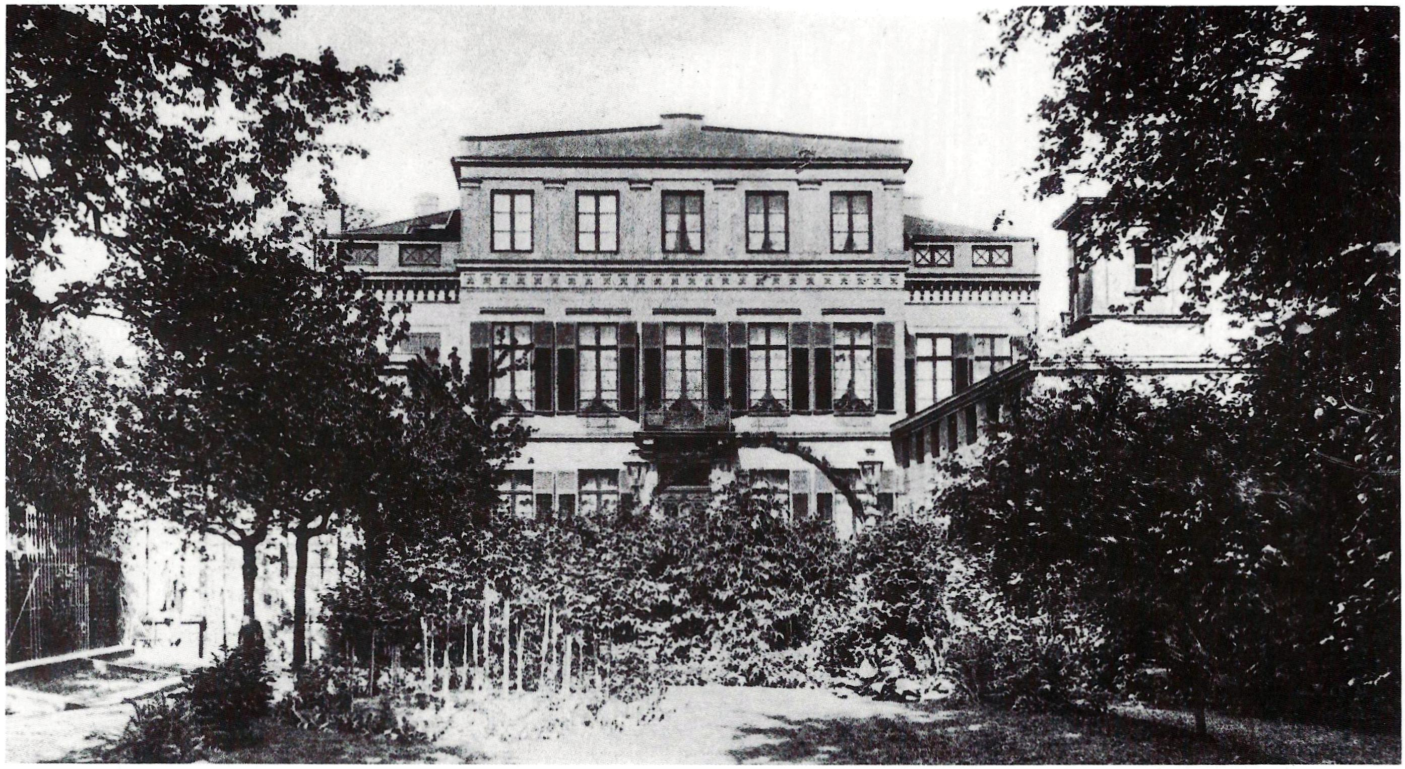 Villa Prym (erbaut 1846/47, 1953–55 abgebrochen), Coblenzerstraße 39, Bonn: Straßenfront, rechts ein südliches Nebengebäude, dahinter der umgebaute Turm der ehemaligen Vinea Domini